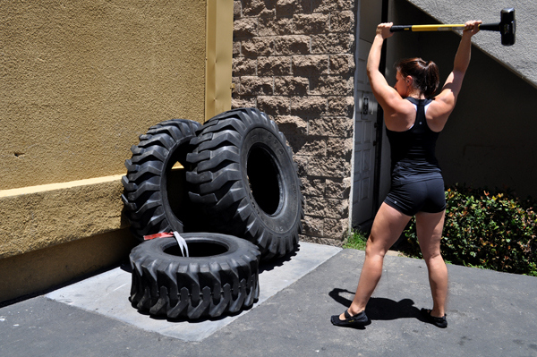 Exercice de frappe sur pneu